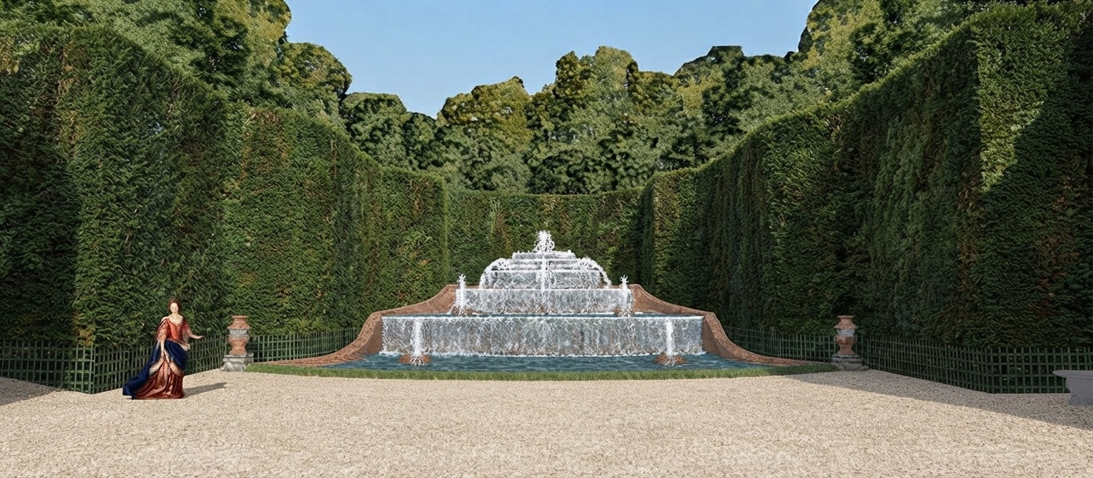 Cascade d'Arthelon, qui termine l'allée basse des jardins bas du château de Meudon, vers 1700.